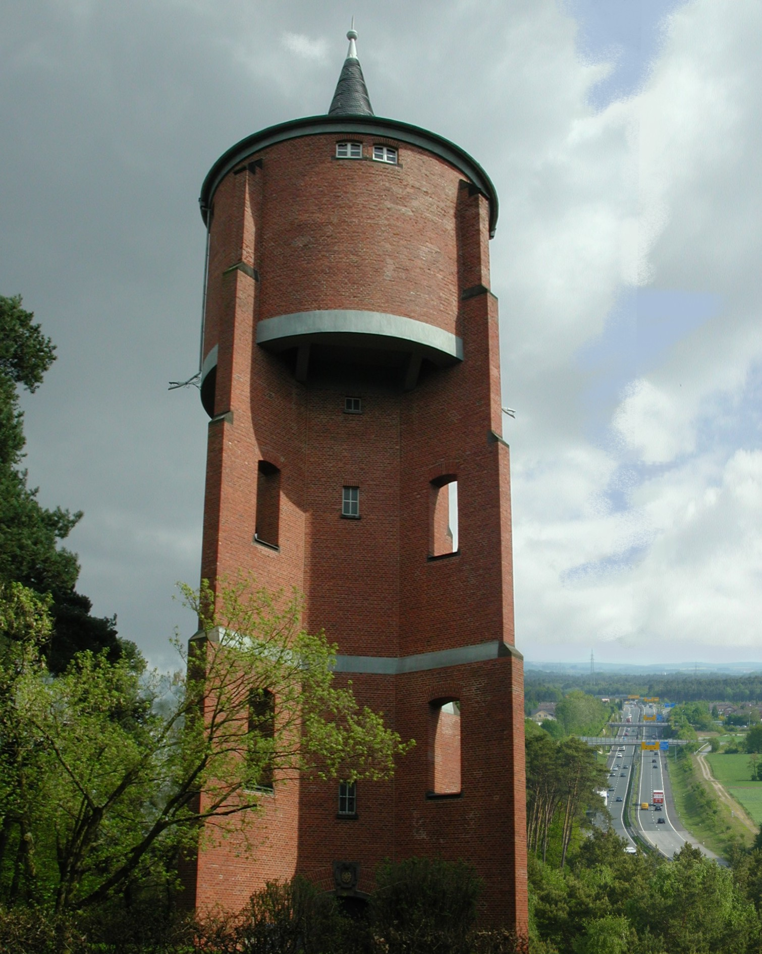 Rodgau Wasserturm Gesamtansicht oberhalb der Bundesstraße 45.